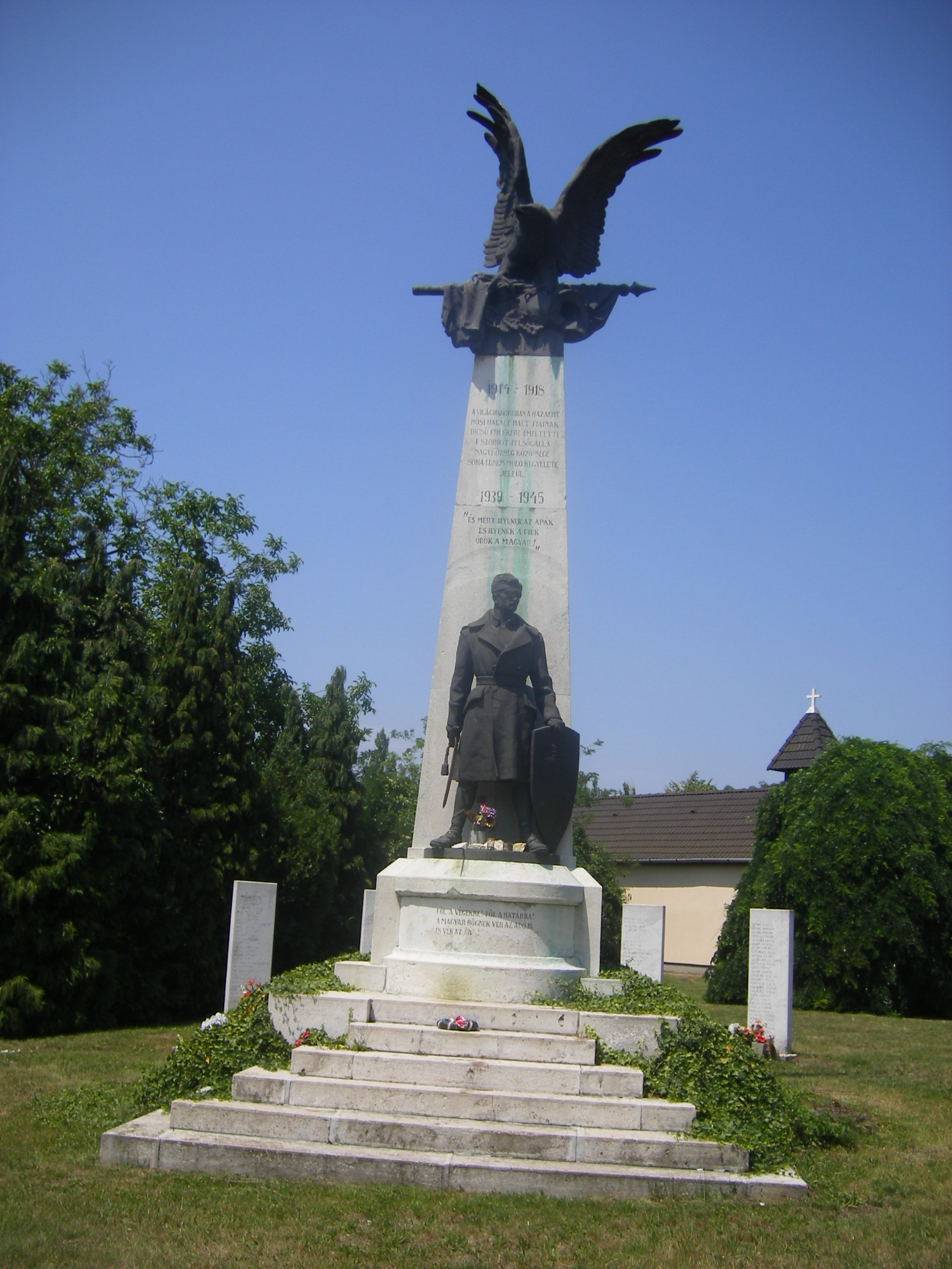 Felsőgalla - Világháborús emlékmű